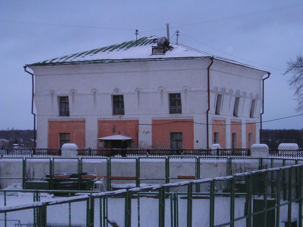 Арсенальная башняиз-за Семёновского моста